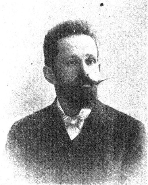 Österreichischer Politiker, Reichsratswahl 1907, Name siehe Dateiname